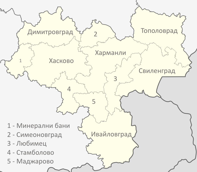 Картата е създадена от Любомир Таушанов